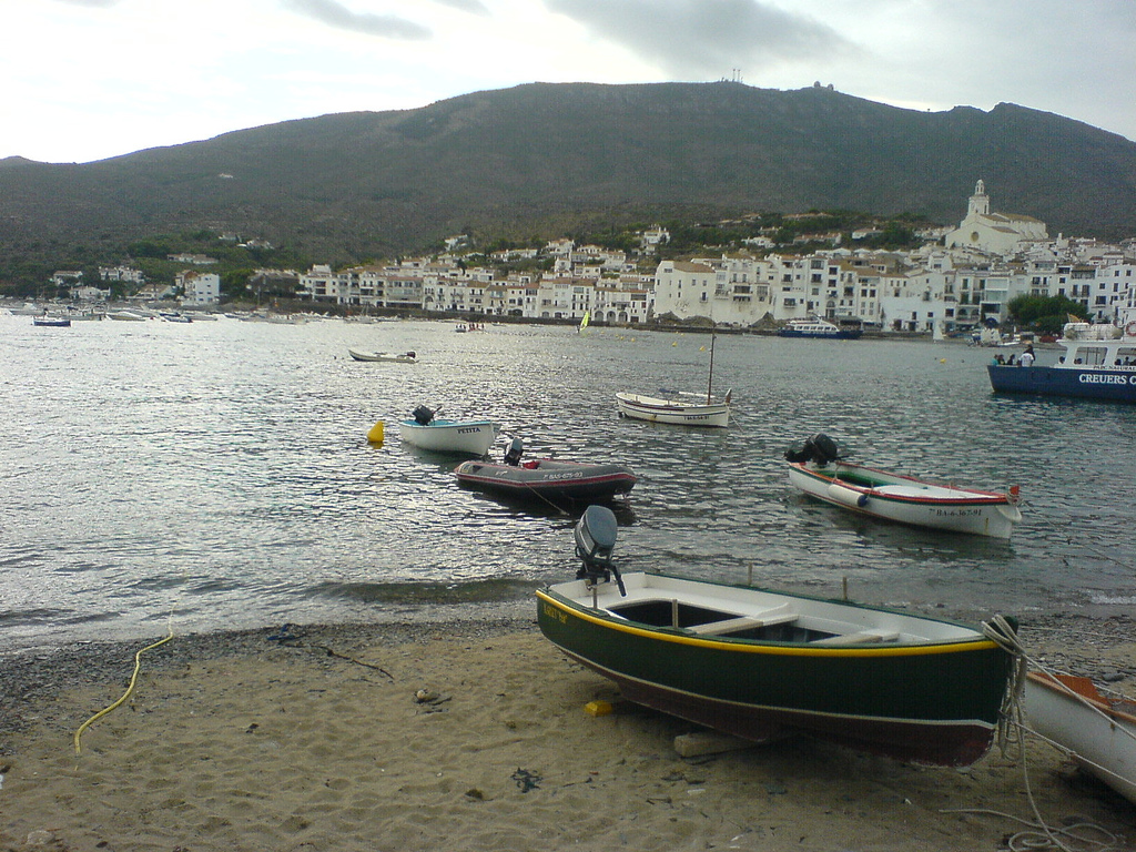 Cadaqués toneel.